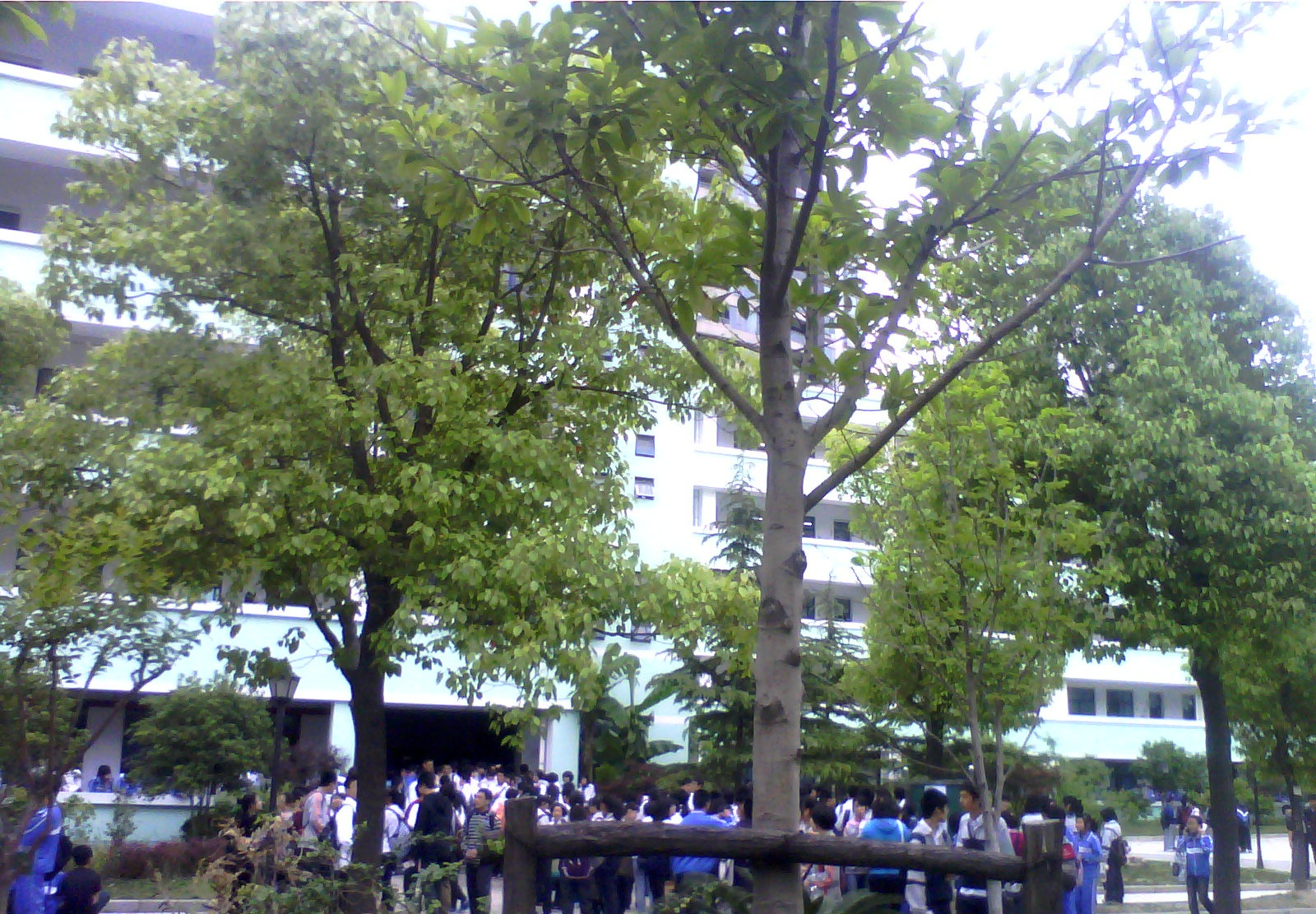 上海中考考场学生排队图